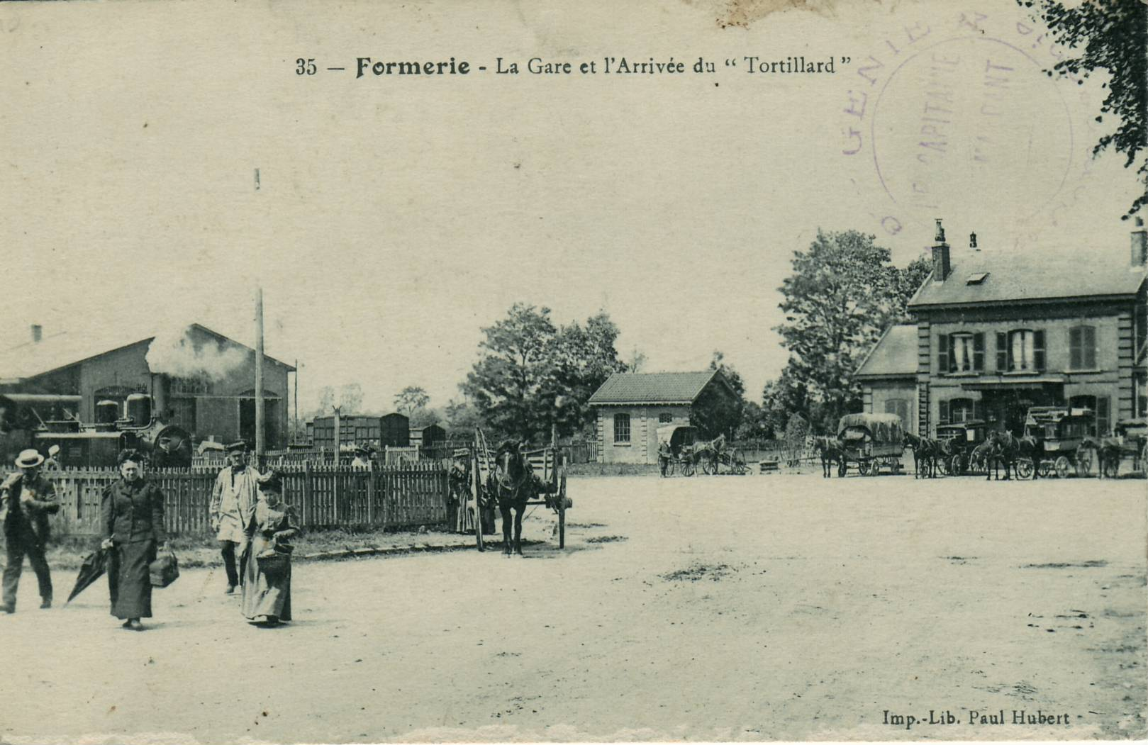 Carte postale éditée par Imp. Lib Paul Hubert N°35 : FORMERIE : La Gare et l'arrivée du Tortillard Il s'agit d'un train de la ligne Milly-sur-Thérain - Formerie, du réseau des chemins de fer départementaux de l'Oise